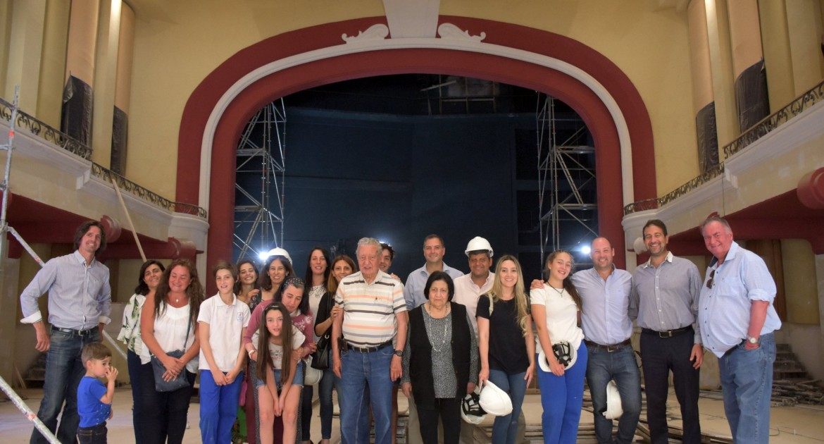 Familia Pose visitando refacciones del teatro de María Natividad Josefa Fernández y su marido Alfredo Pose.